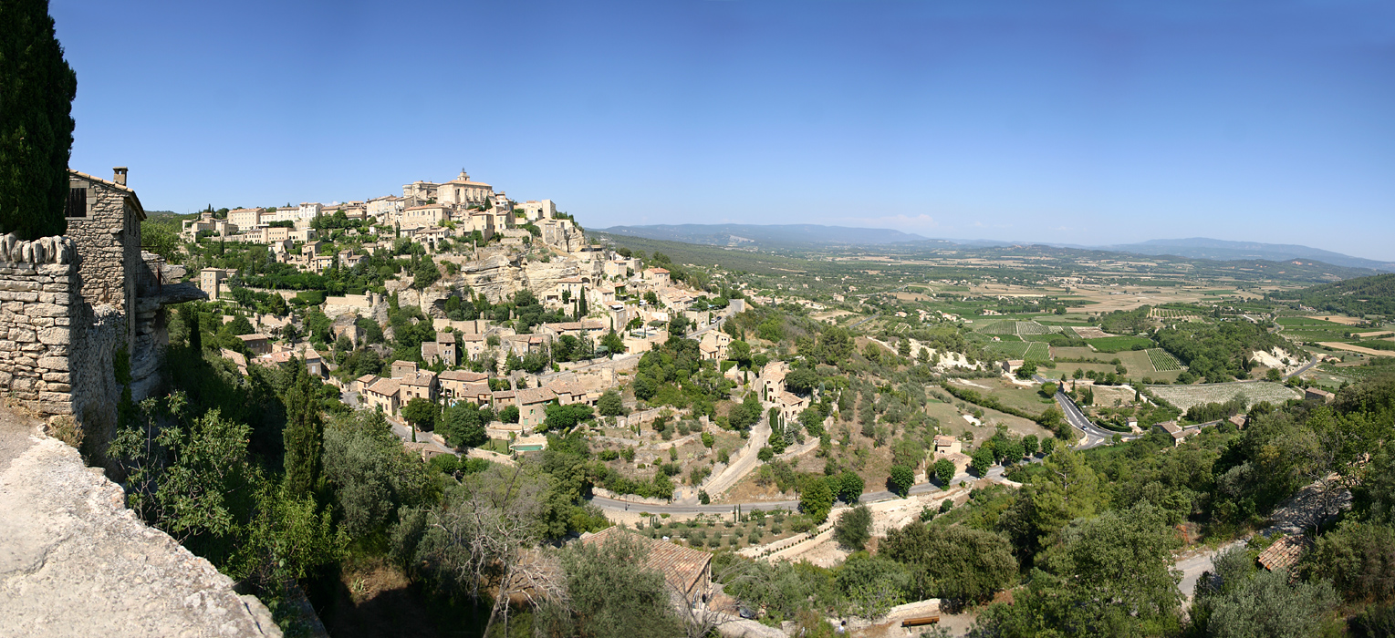 Die Stadt Gordes, Provence, Frankreich